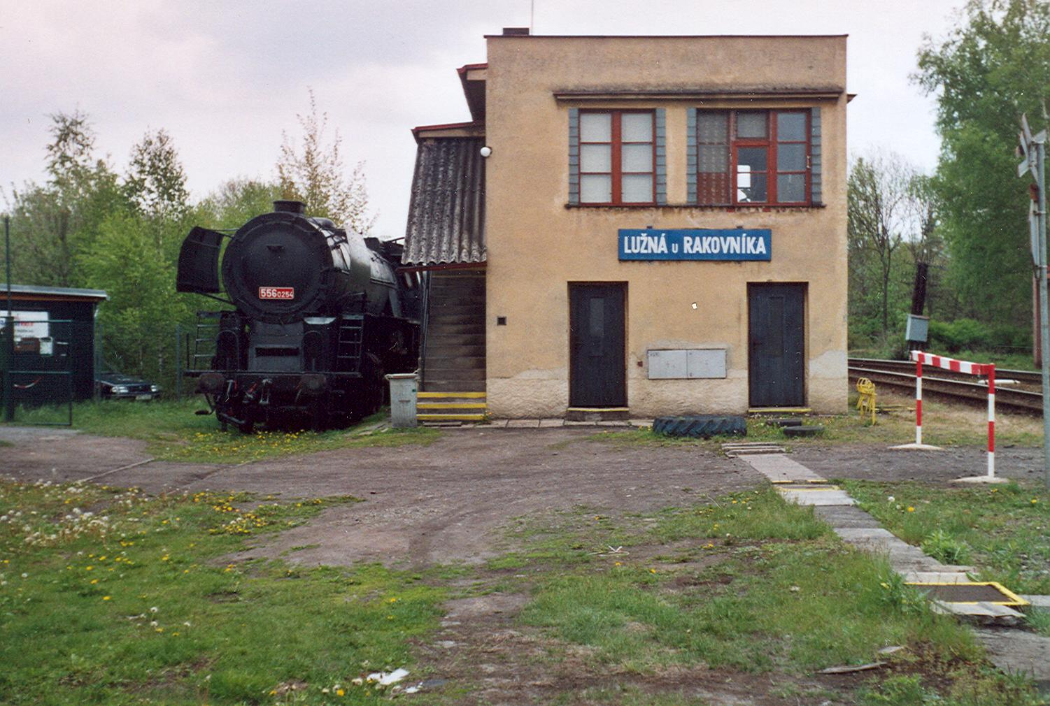 Eingangsbereich des Eisenbahnmuseums in Lužna